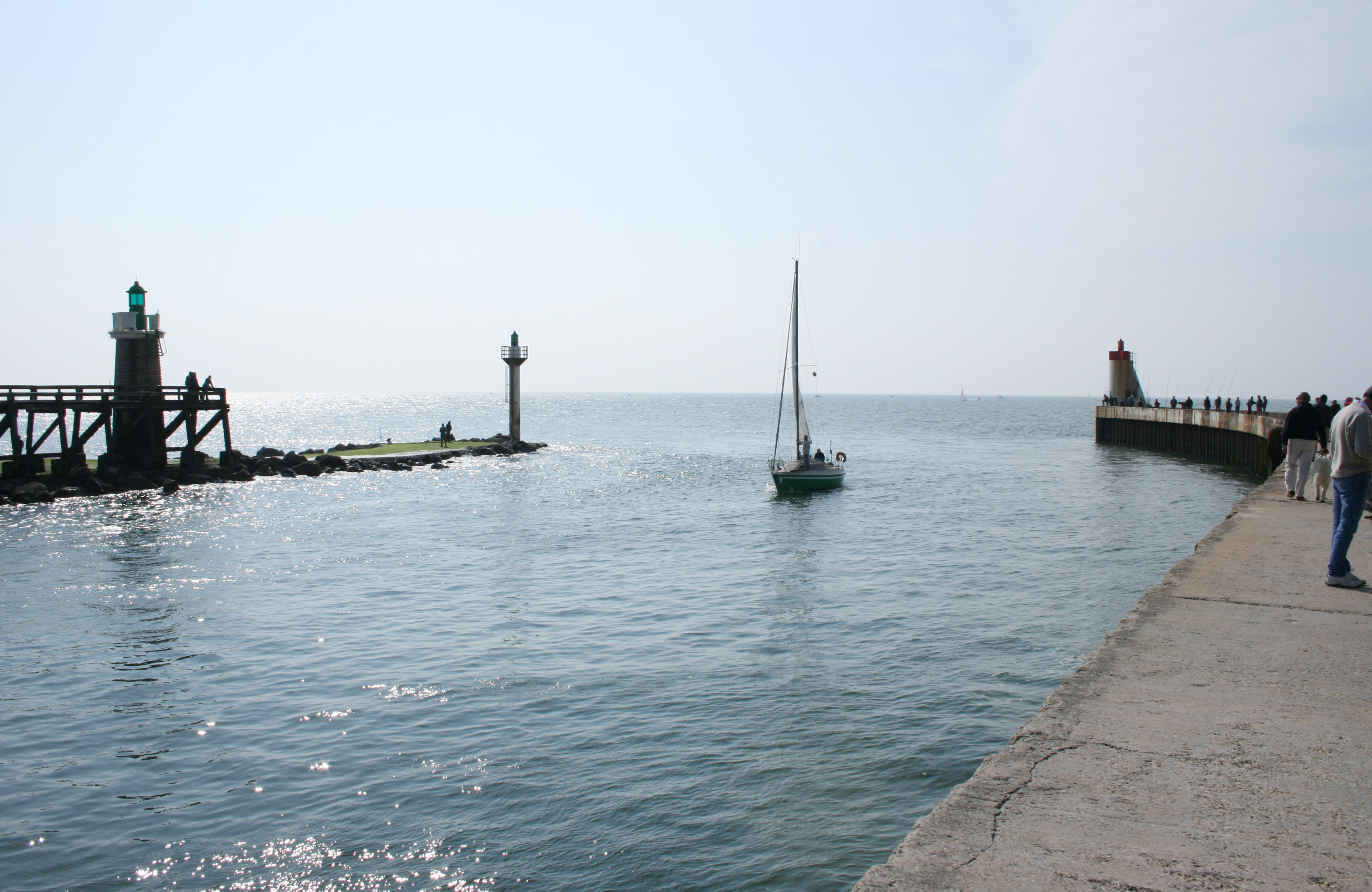 L'entrée du chenal du port de Capbreton